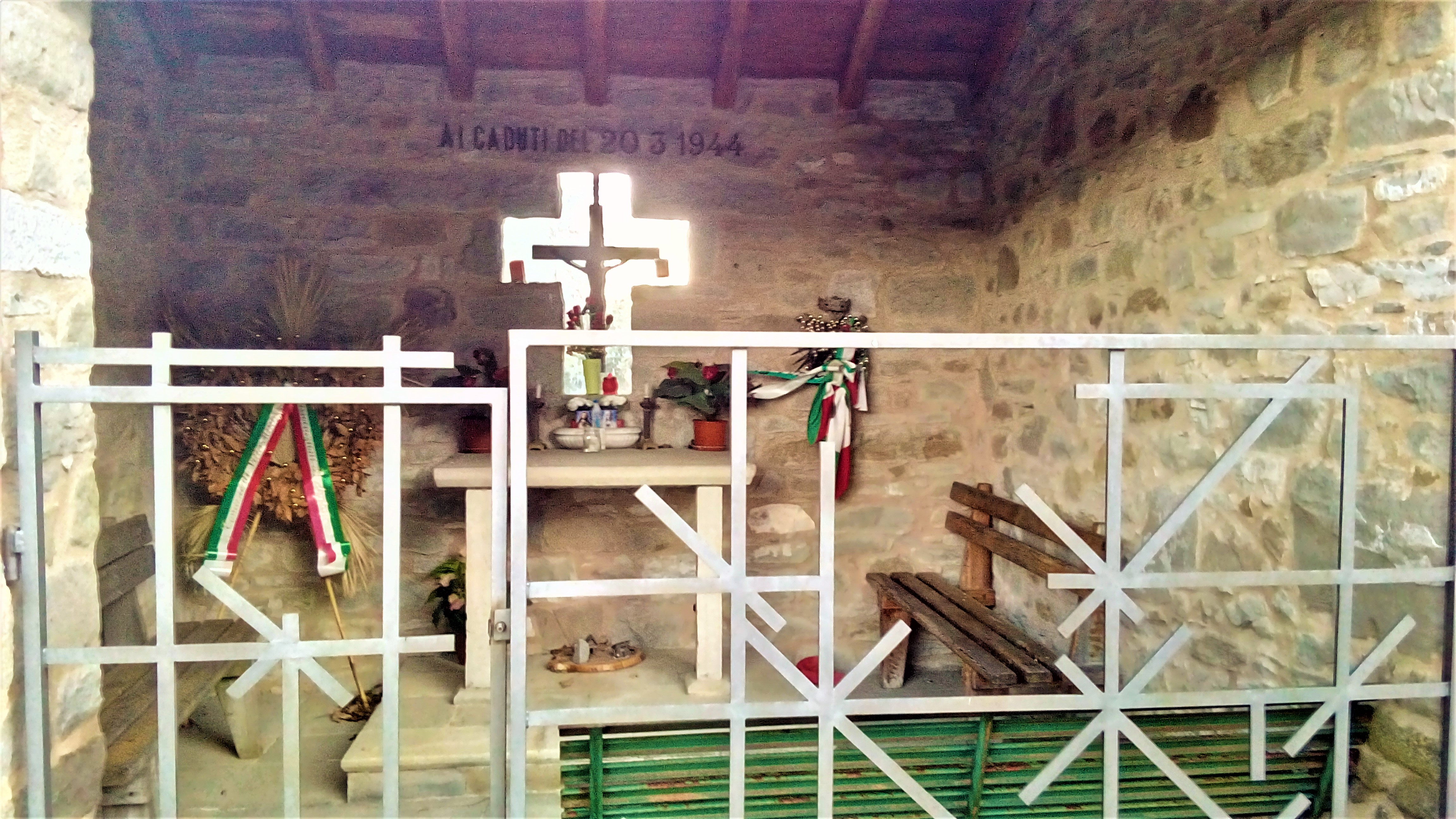 Cervarolo (Reggio Emilia)